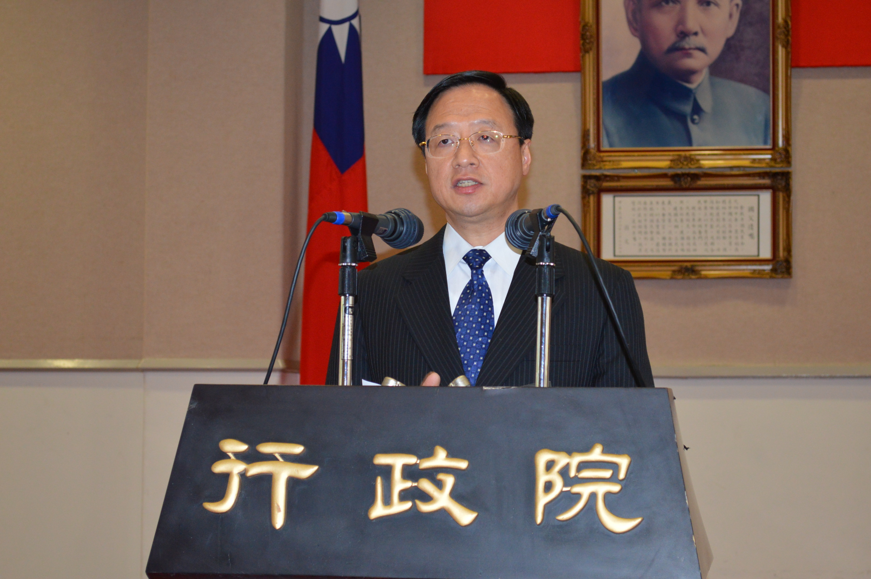 江宜樺3月24日譴責衝擊行政院事件。